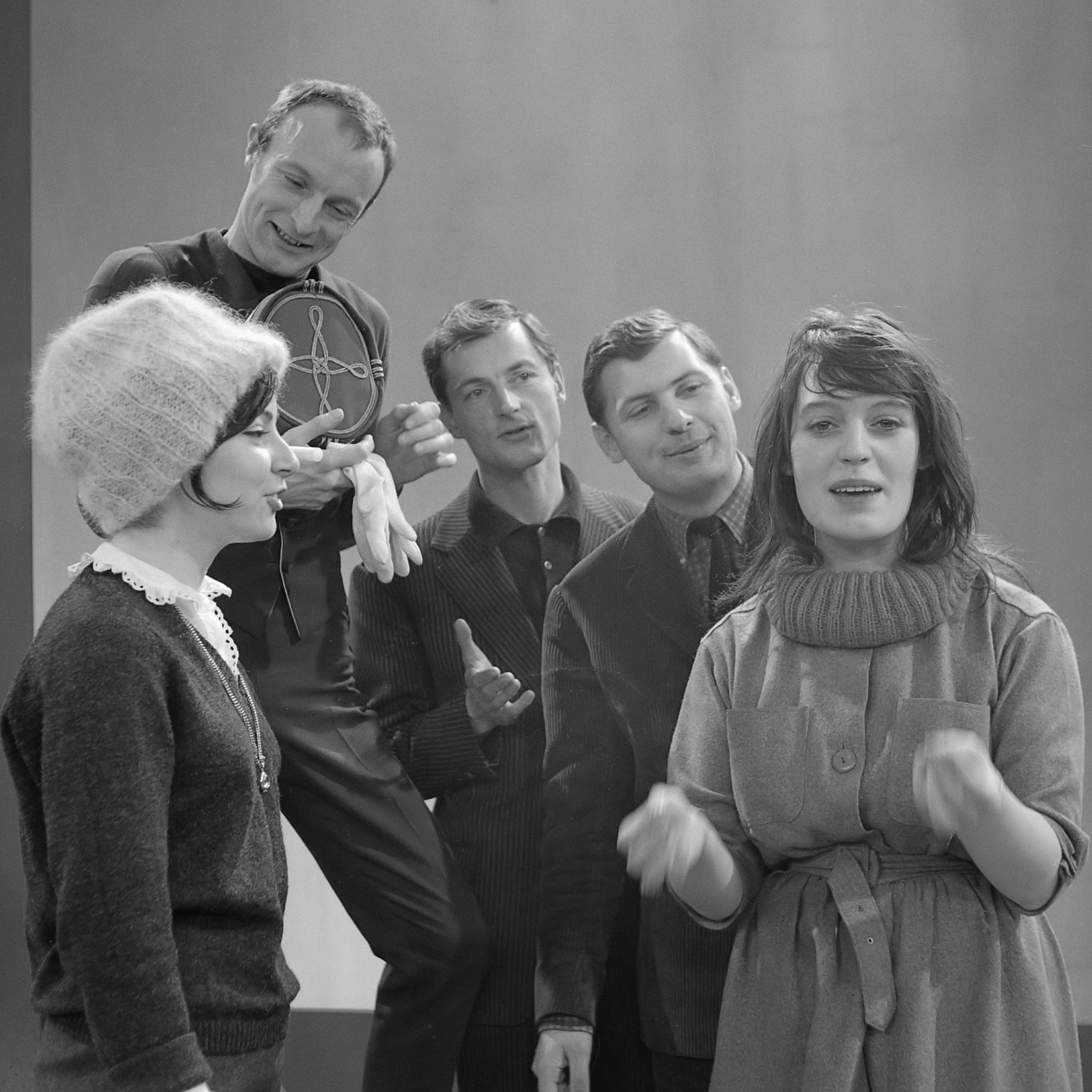 Televisiecabaretprogramma "Croissantje half om", v.l.n.r. Janine, Will Spoor, Doude van Herwijnen, Nico en Wilhelmina 28 december 1960